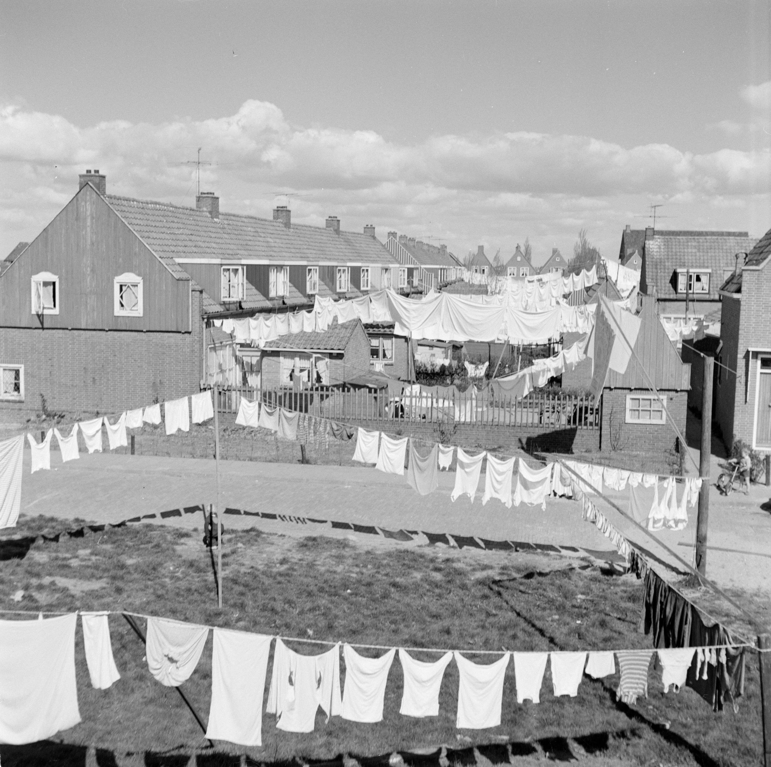 Collectie / Archief : Fotocollectie Van de Poll Reportage / Serie : Volendam Beschrijving : Rij huizen in Volendam waarbij de was hangt te drogen Datum : 1 september 1959 Locatie : Noord-Holland, Volendam Trefwoorden : straatbeelden, wasgoed, woningen Fotograaf : Poll, Willem van de, [onbekend] Auteursrechthebbende : Nationaal Archief Materiaalsoort : Negatief (6x6) Nummer archiefinventaris : bekijk toegang 2.24.14.02 Bestanddeelnummer : 254-3834